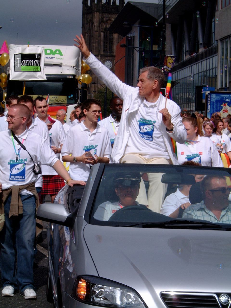 Sir Ian McKellen at Europride 2003 Parade